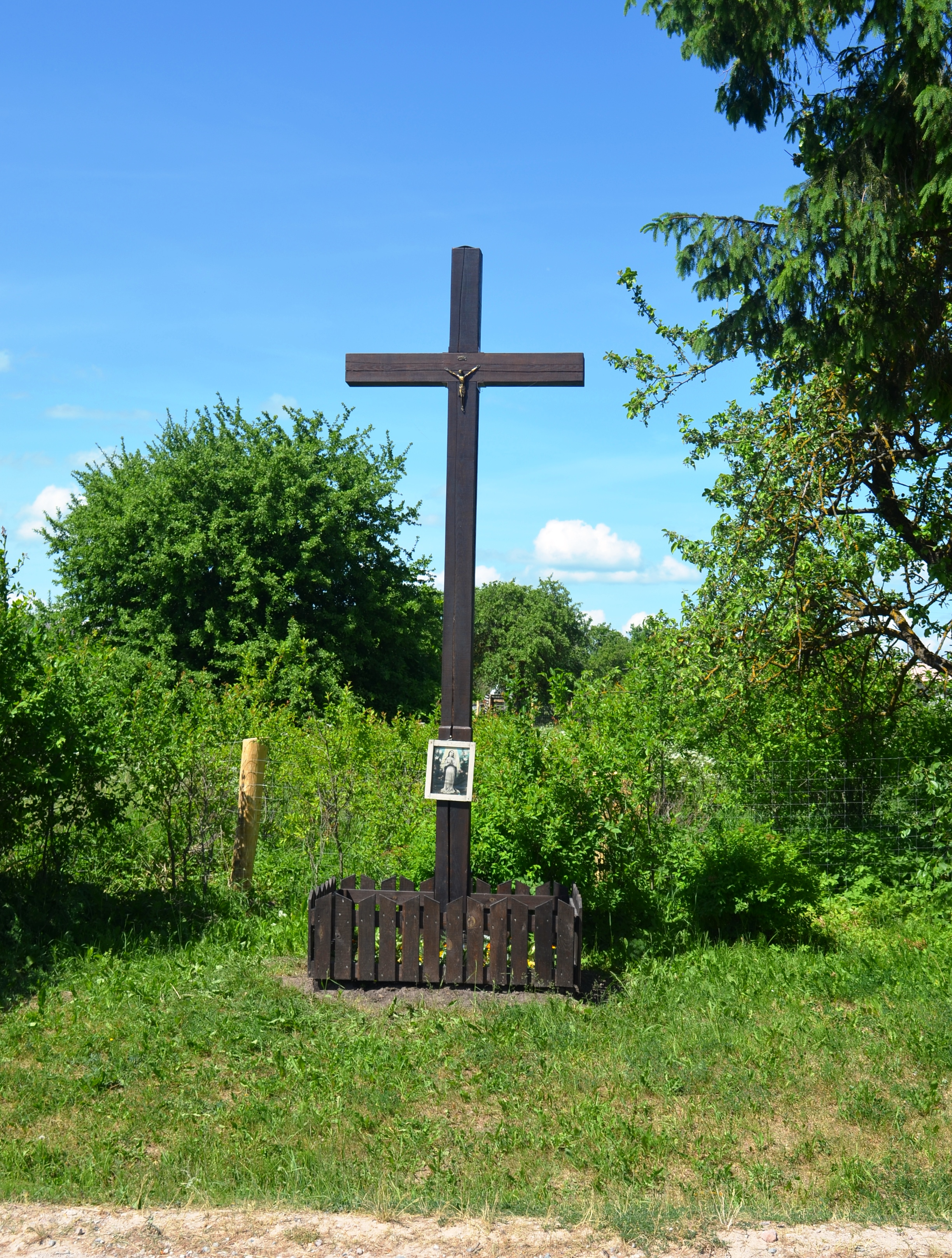 Kryžius, Puodžiūnai, Vilniaus r.